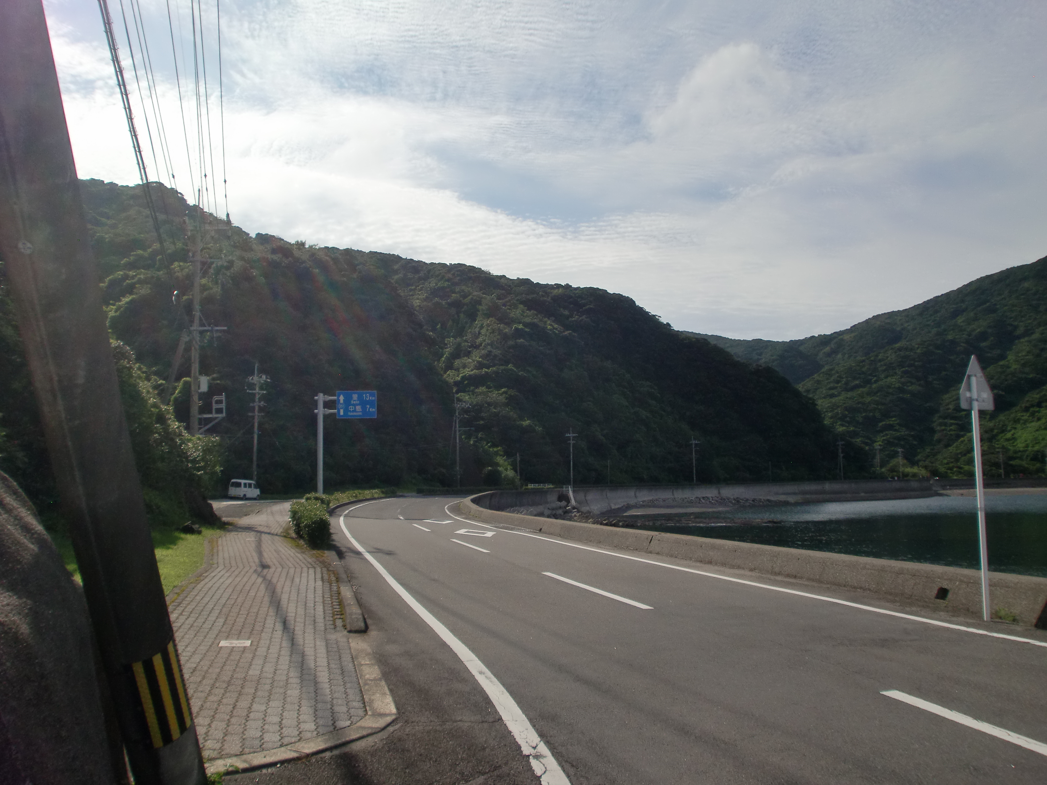 鹿児島県道351号鹿島上甑線の2014年8月時点の起点（鹿島～平良間が未開通の為）。